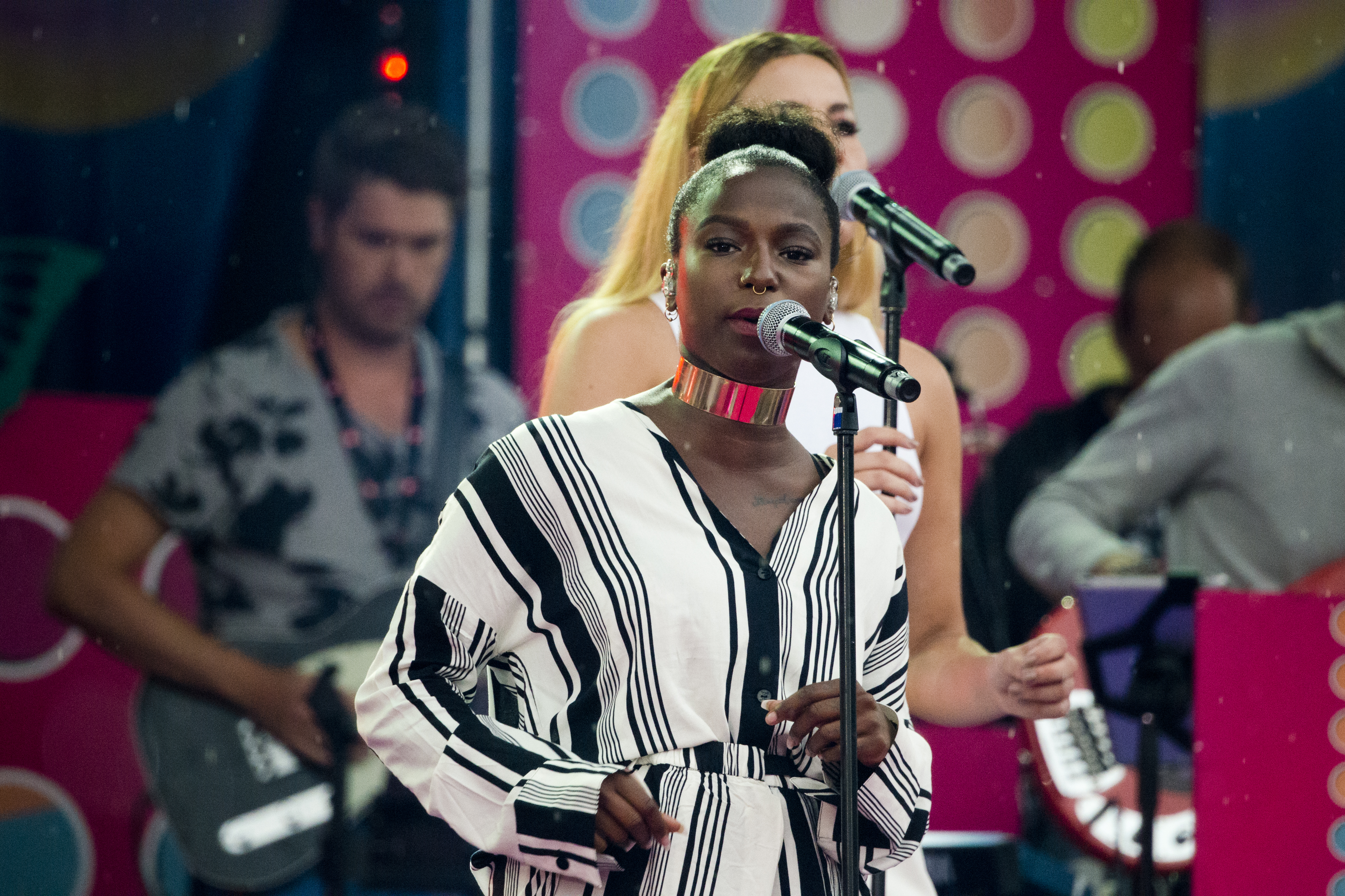 Sabina Ddumba På Sommarkrysset, Gröna Lund i Stockholm